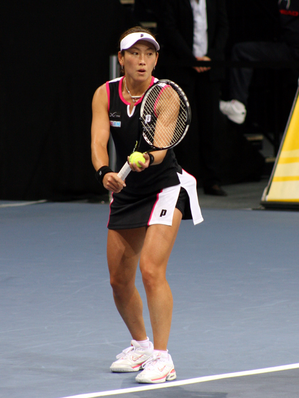 Ai Sugiyama am Zurich Open 2006